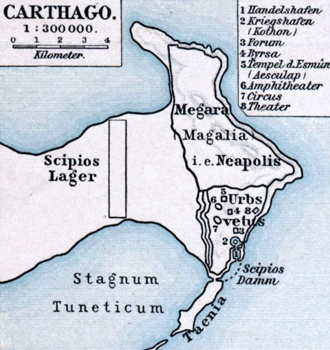 Belagerung Karthagos durch Publius Cornelius Scipio Aemilianus Africanus.